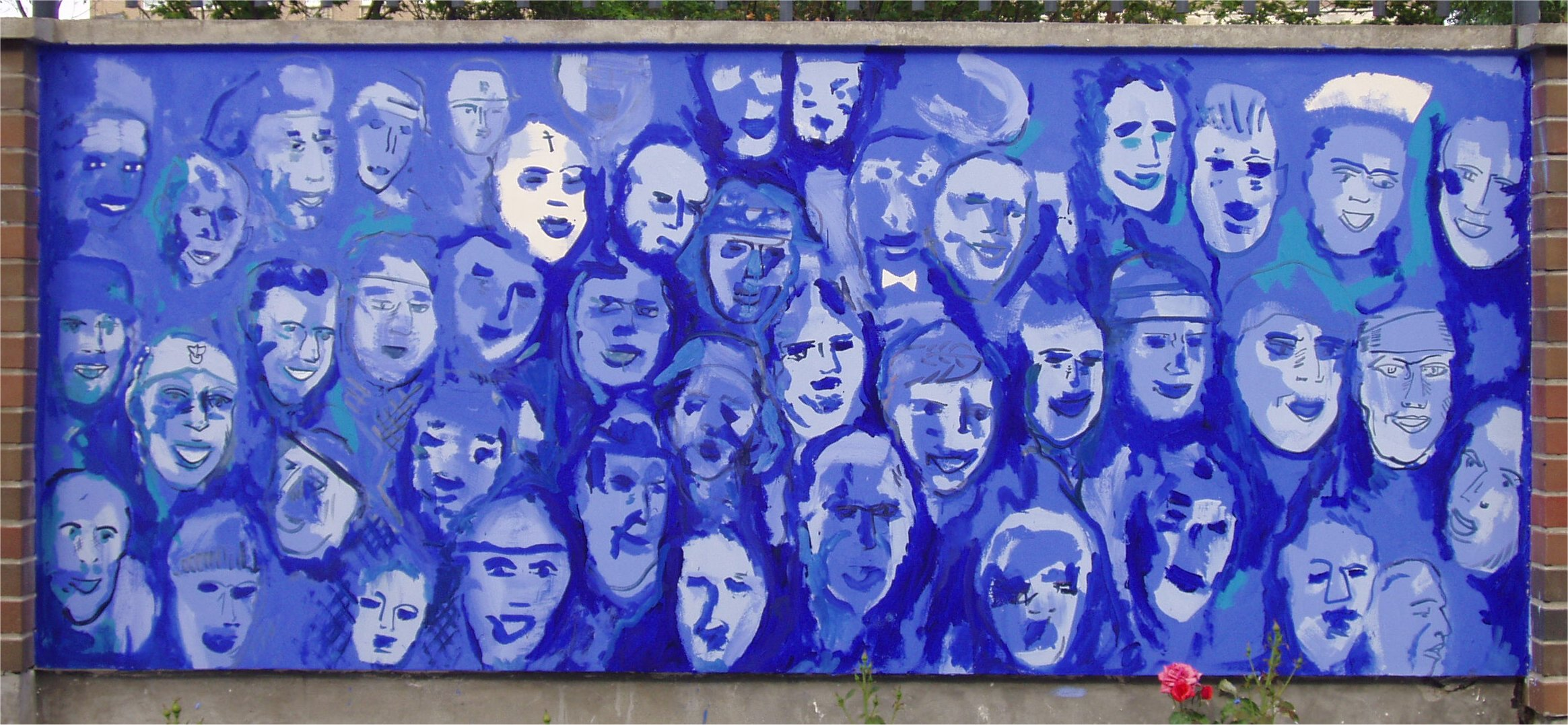 Obraz Edwarda Dwurnika "Październik". Namalowany w czerwcu 2006 roku na murze w Muzeum Powstania Warszawskiego (fot Zu).